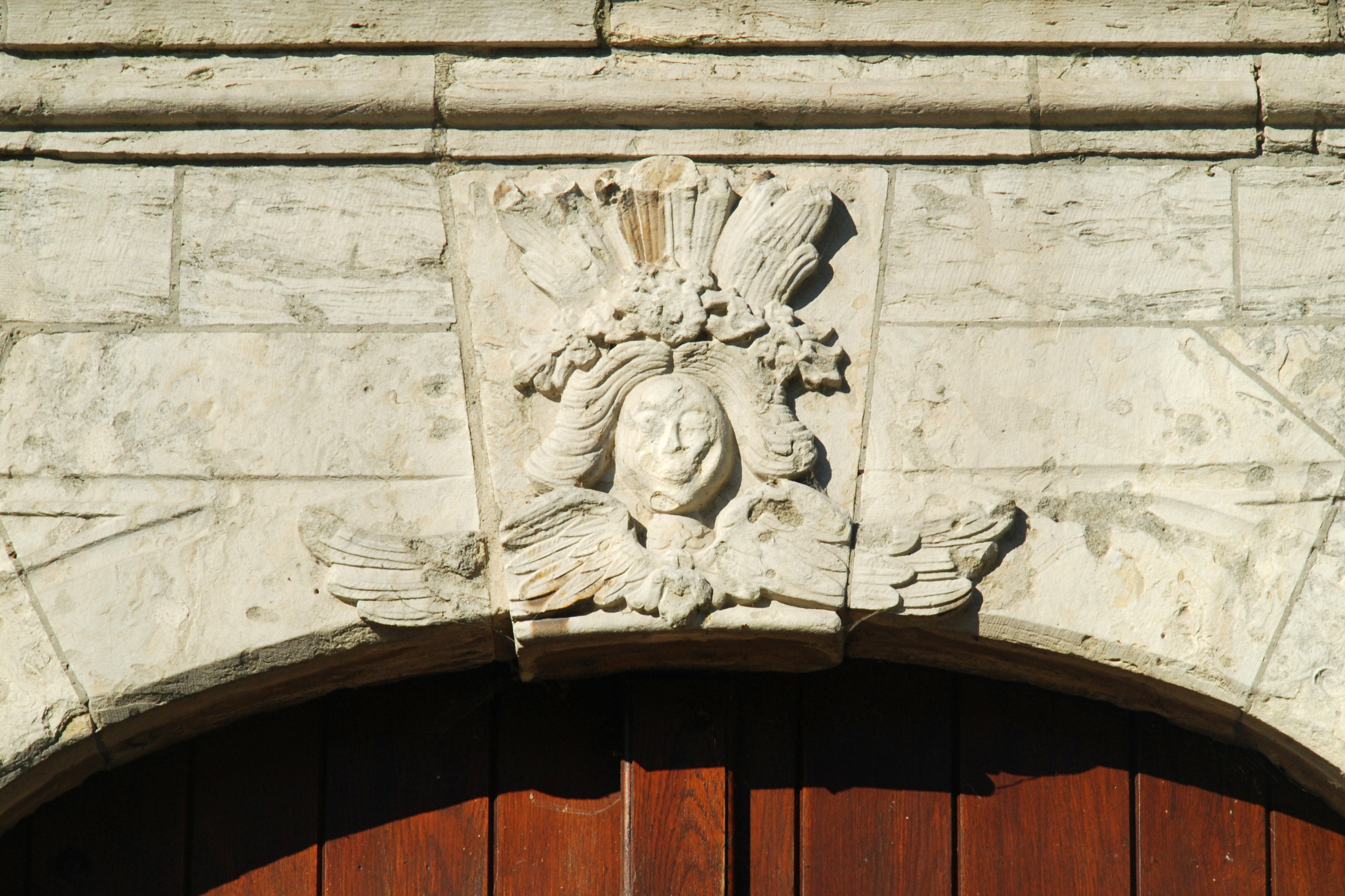 Belgique - Brabant wallon - Jodoigne - Saint-Remy-Geest - Église Saint-Remy